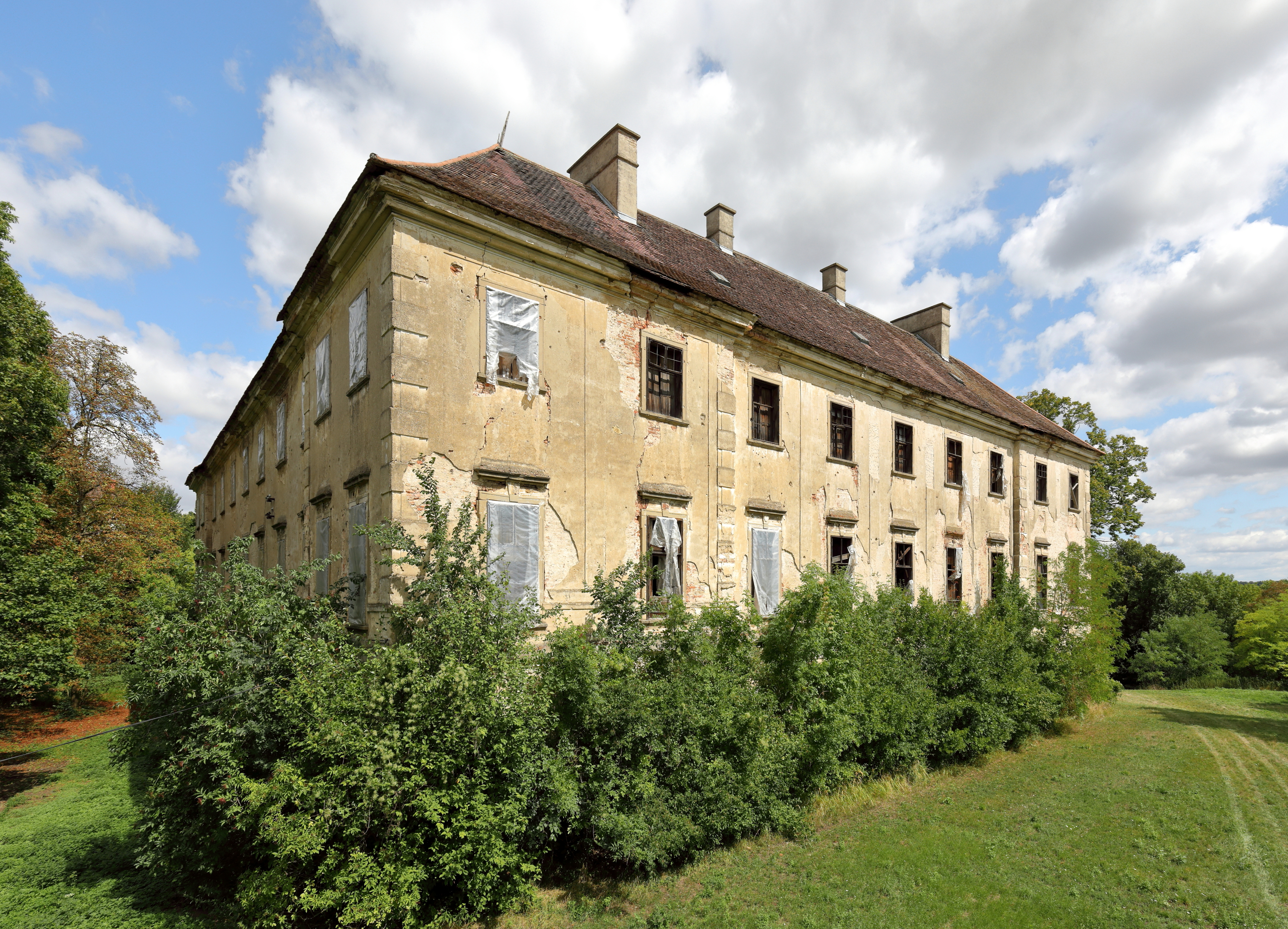 Westansicht des Schlosses Ladendorf in der niederösterreichischen Gemeinde Ladendorf.Das vierflügelige Anlage um einen Rechteckhof wurde im 16. Jahrhundert errichtet und 1722 umgebaut. Im 2. Weltkrieg bzw. in der Besatzungszeit wurde das Schloss schwer beschädigt und ist in einem ruinösen Zustand.